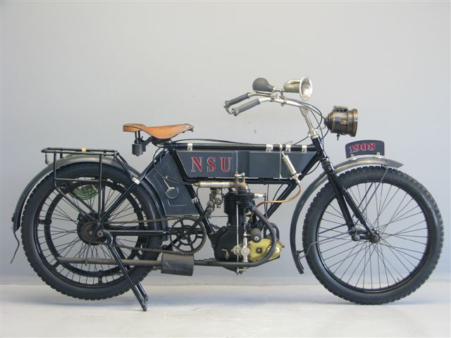 NSU 3 ½ hp 410 cc ioe motorcycle from 1908